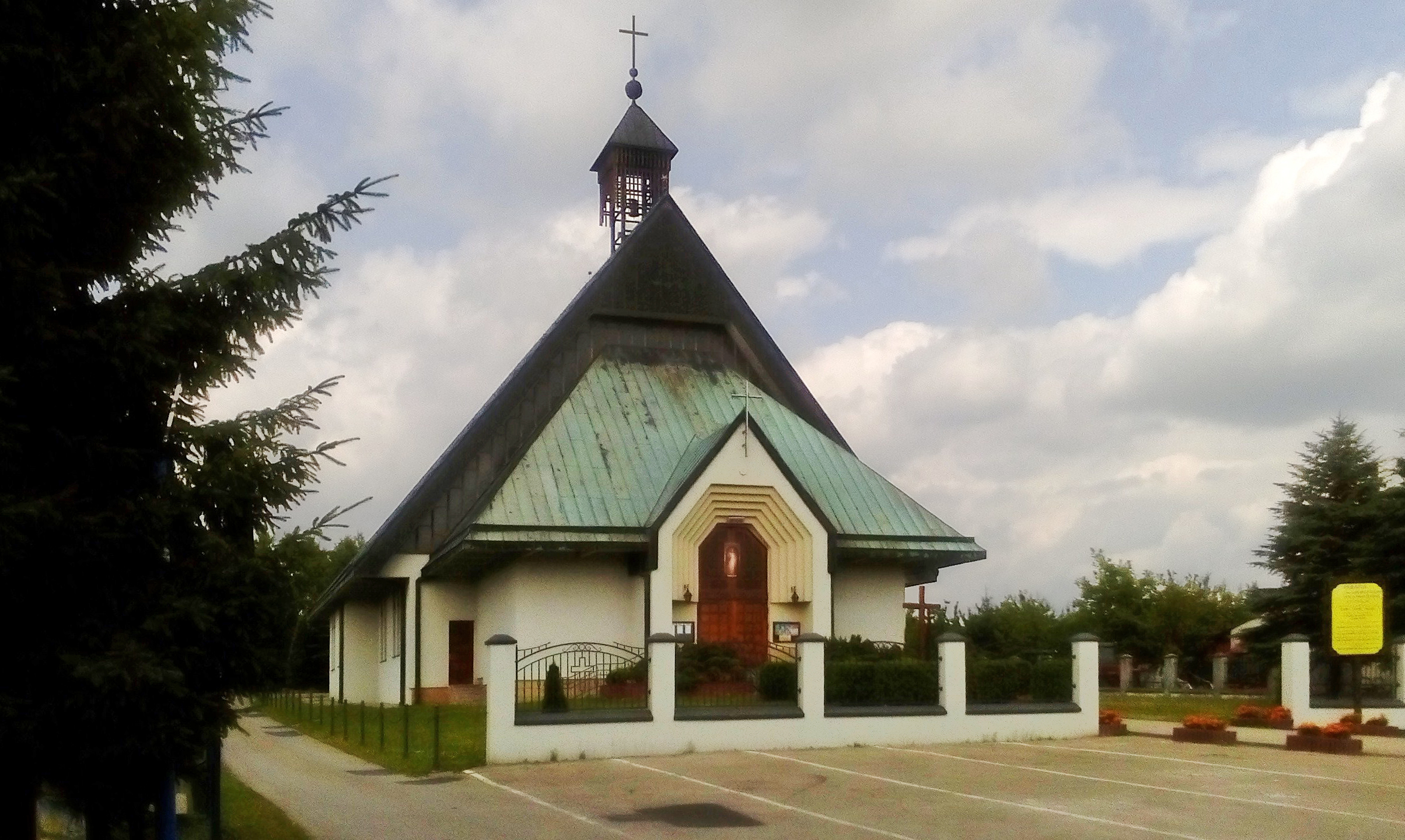 Kościół Najświętszego Serca Pana Jezusa wa Rącznej